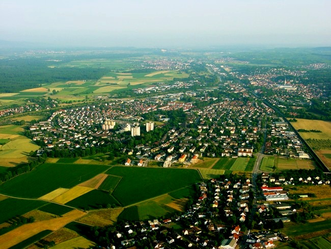 Luftbild von Emmendingen aufgenommen bei einer Ballonfahrt